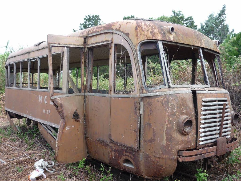 Automotrice M1.37 in corso di restauro da parte di appassionati a Catanzaro Lido